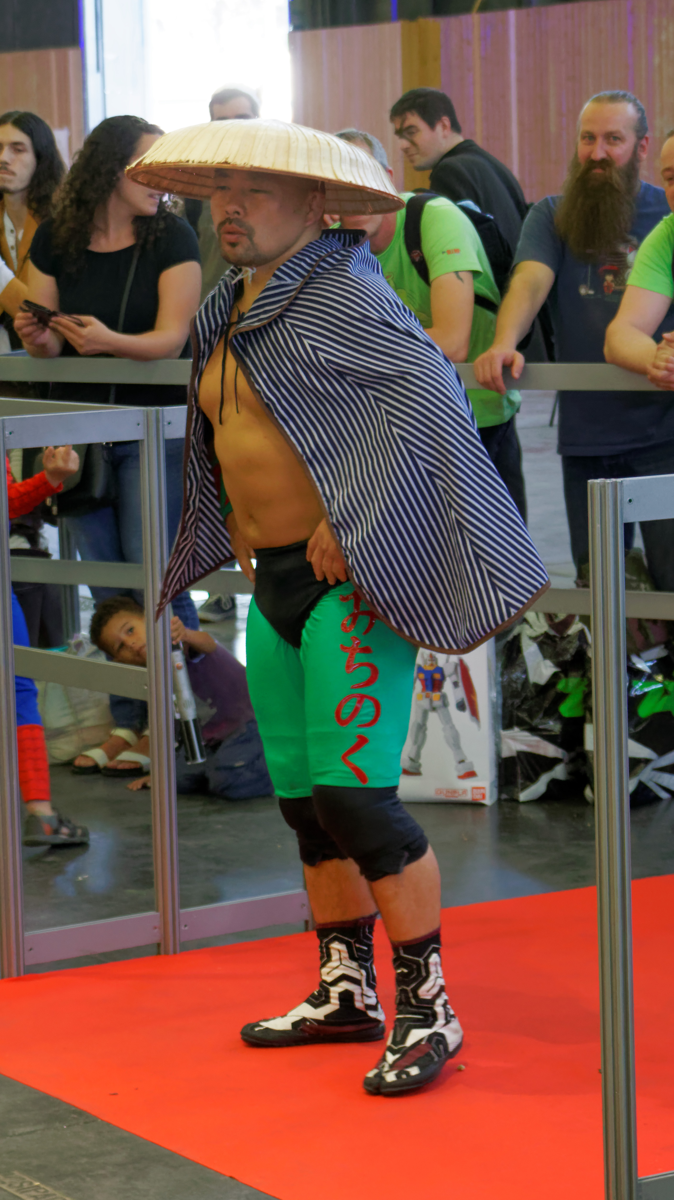 Japan Expo est un salon evenementiel professionnel francais sur la culture populaire japonaise, qui se deroule au parc des expositions de Paris-Nord Villepinte tous les ans en debut du mois de juillet, voire en fin du mois de juin sur une periode de quatre jours. Il s'agit d'une manifestation culturelle consacree aux manga, aux jeux video, aux anime, mais aussi aux arts martiaux, a la mode, a la musique (J-pop, Jrock, traditionnel), au cinema, aux traditions et cultures, aux jeunes artistes et createurs, au sport mecanique.